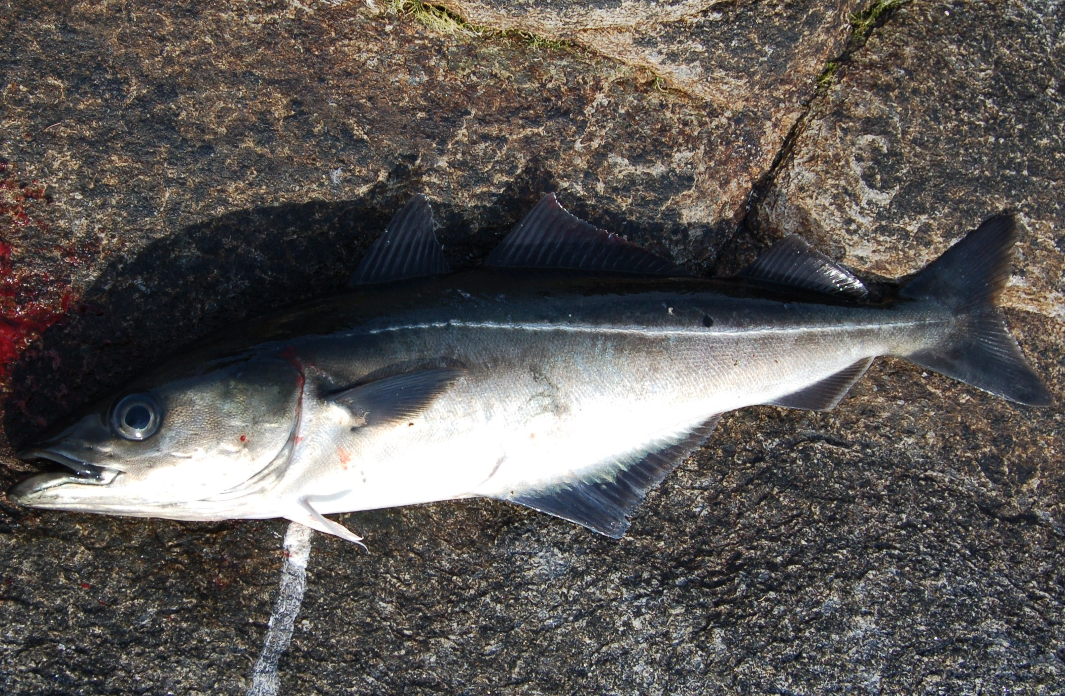 Pollachius virens - Sei tatt i Rystraumen ved Tromsø